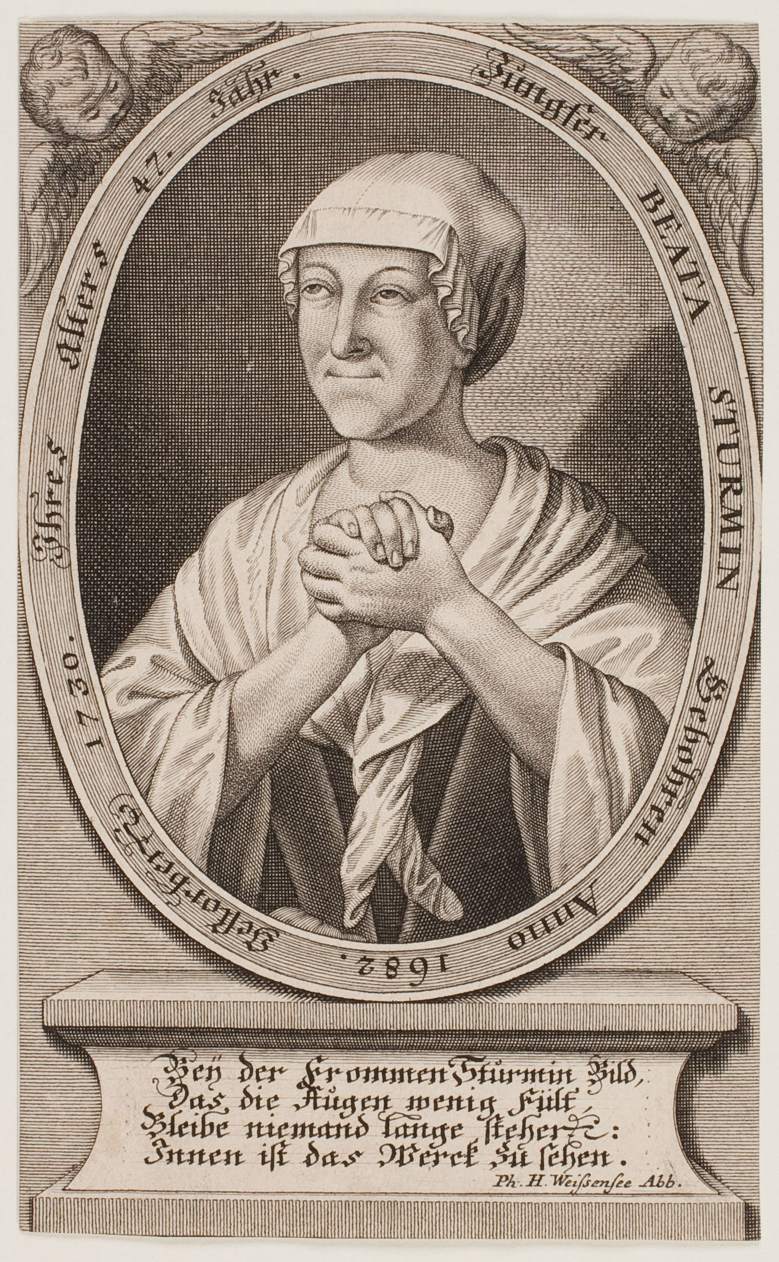 Bildnis Beata Sturm, genannt Württembergische Tabea, 1682-1730; Herzog August Bibliothek Wolfenbüttel, Inv. A 21458; Bilddatei: haba-21458; Kupferstich, 153 x 94 mm